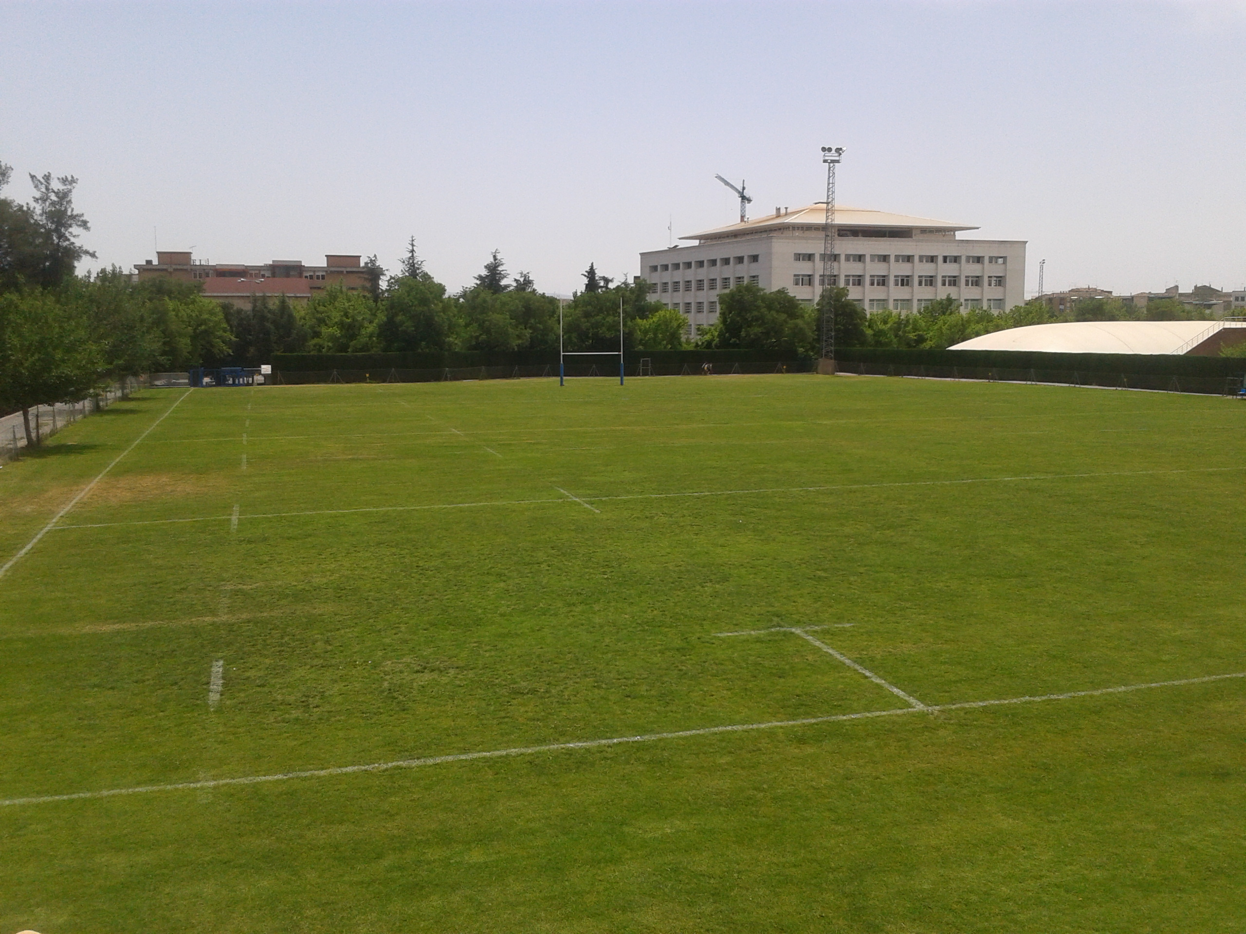 Campo de rugby de Fuentenueva tomada desde la calle del Rector Martín Ocete